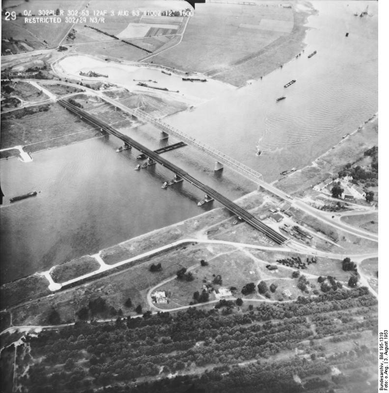 Rheinbefliegung der Alliierten 1953